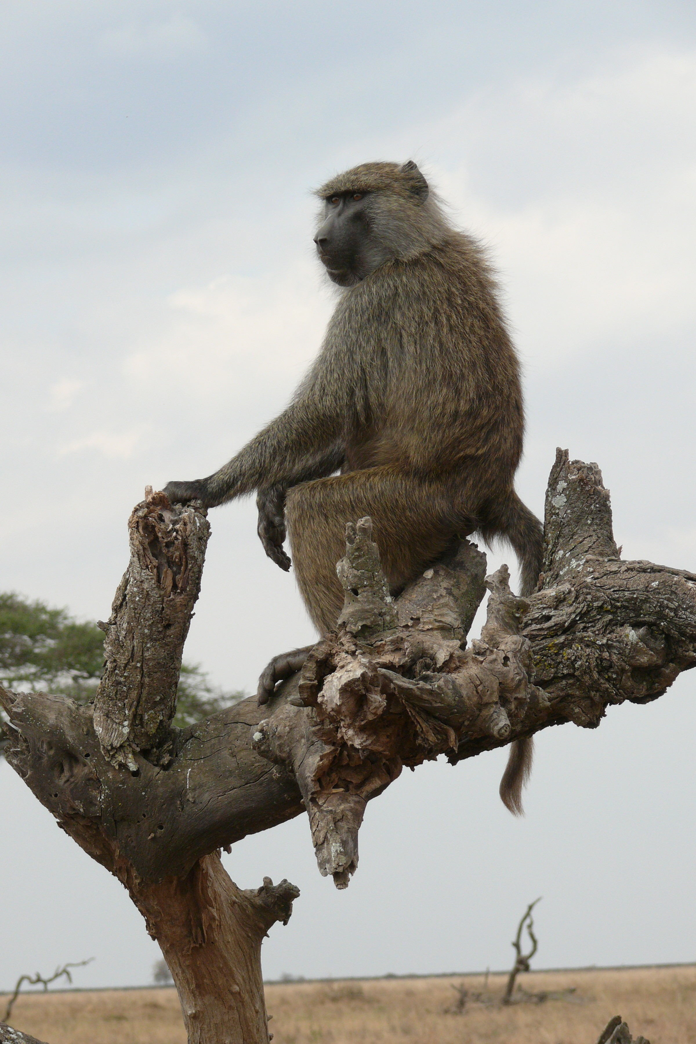 Anubispavian oder Grüner Pavian (Papio anubis)